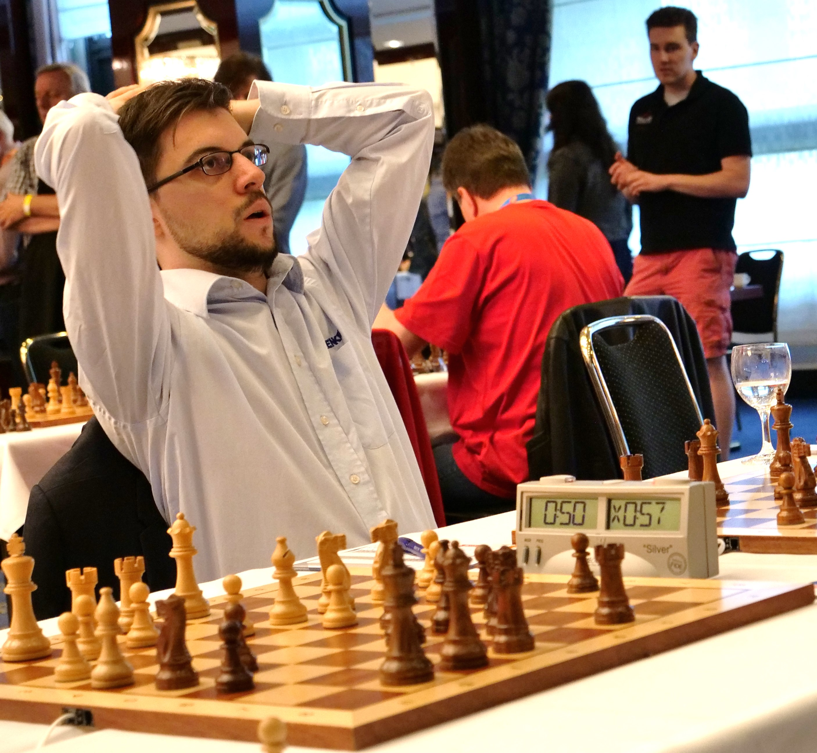 Maxime Vachier-Lagrave - Bundesliga-Endrunde 30-4-2018